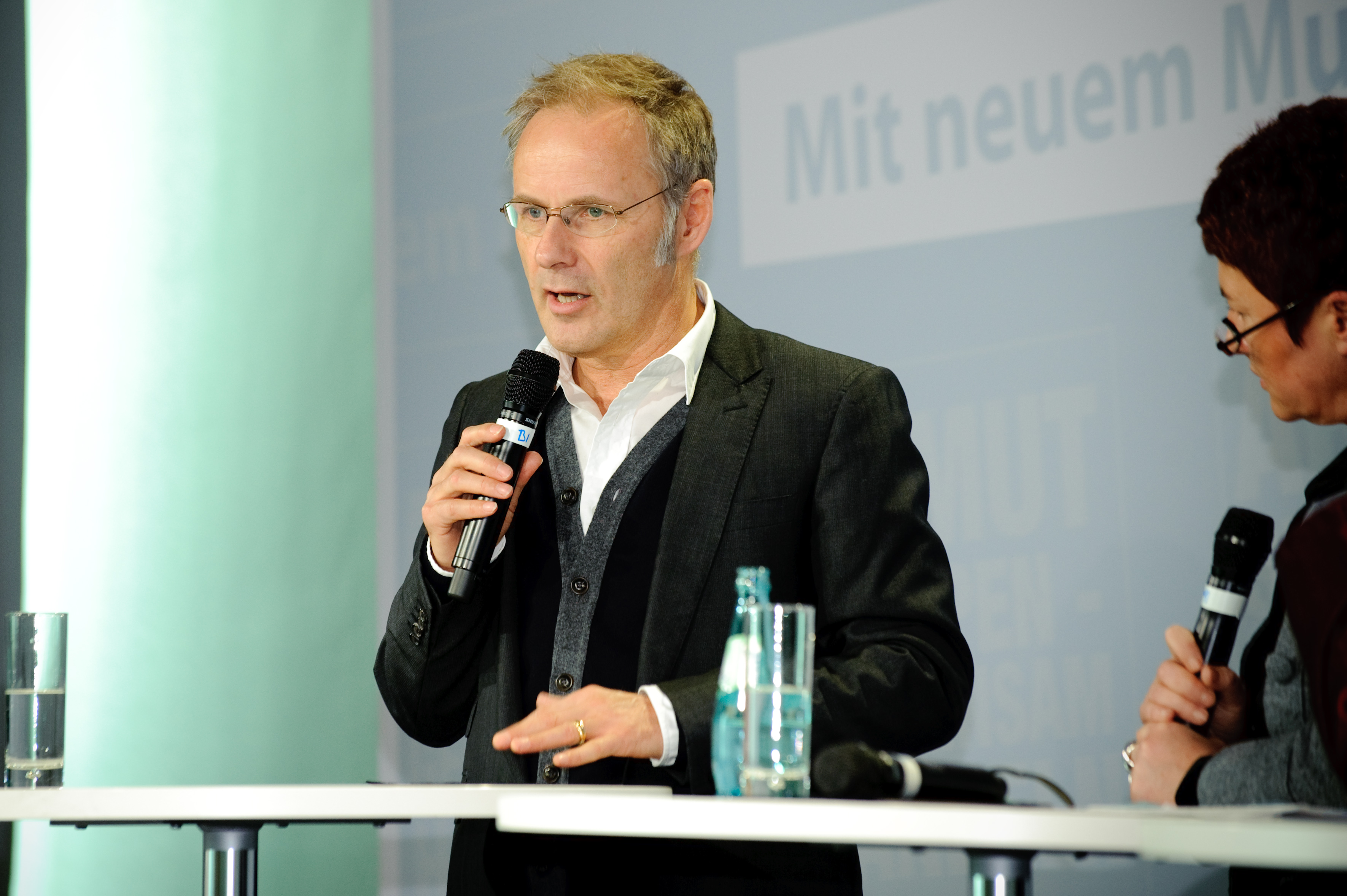 Auftaktveranstaltung Europäisches Jahr gegen Armut und soziale Ausgrenzung. Foto: Stephan Röhl